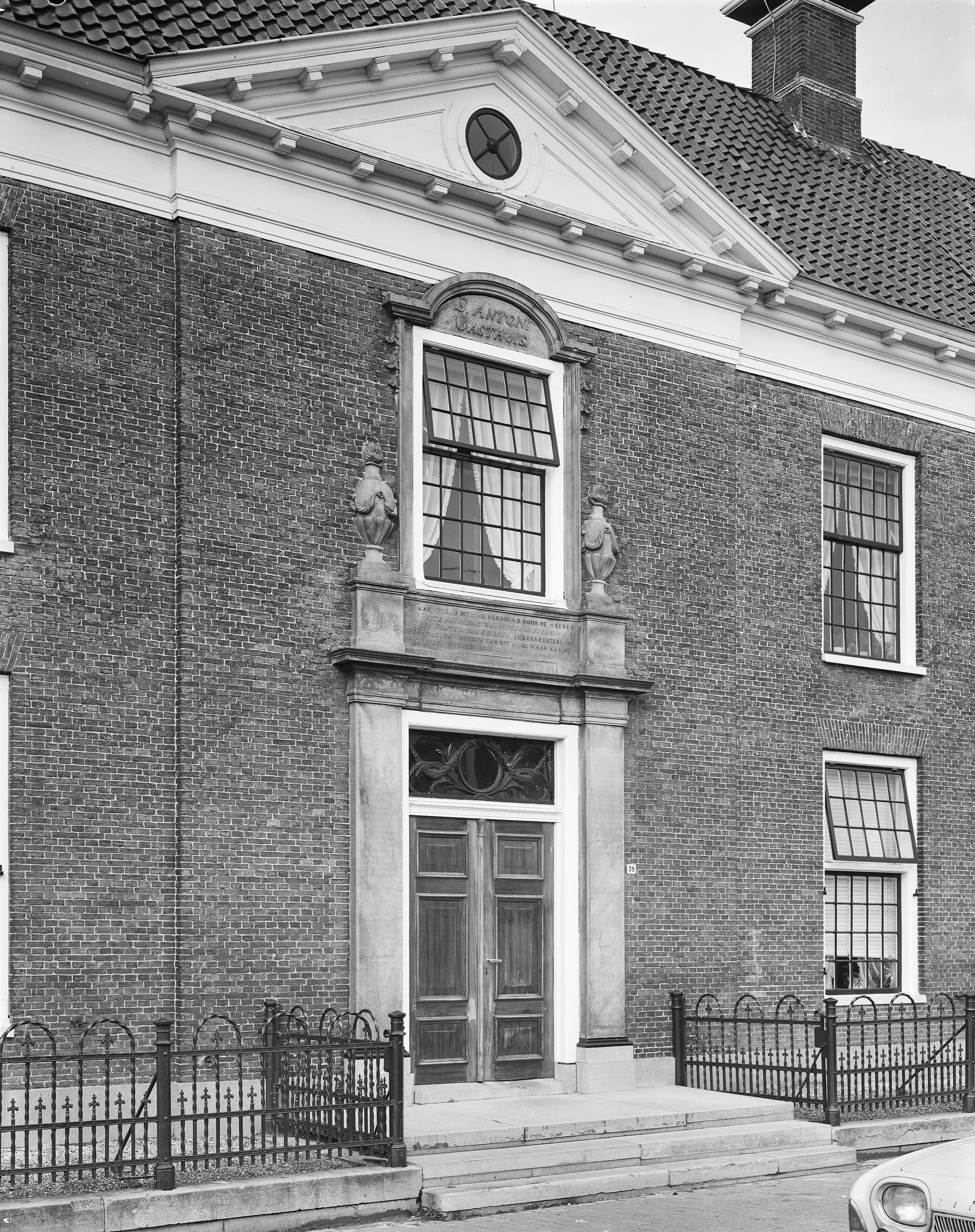 St.Anthonius Gasthuis: middenpartij